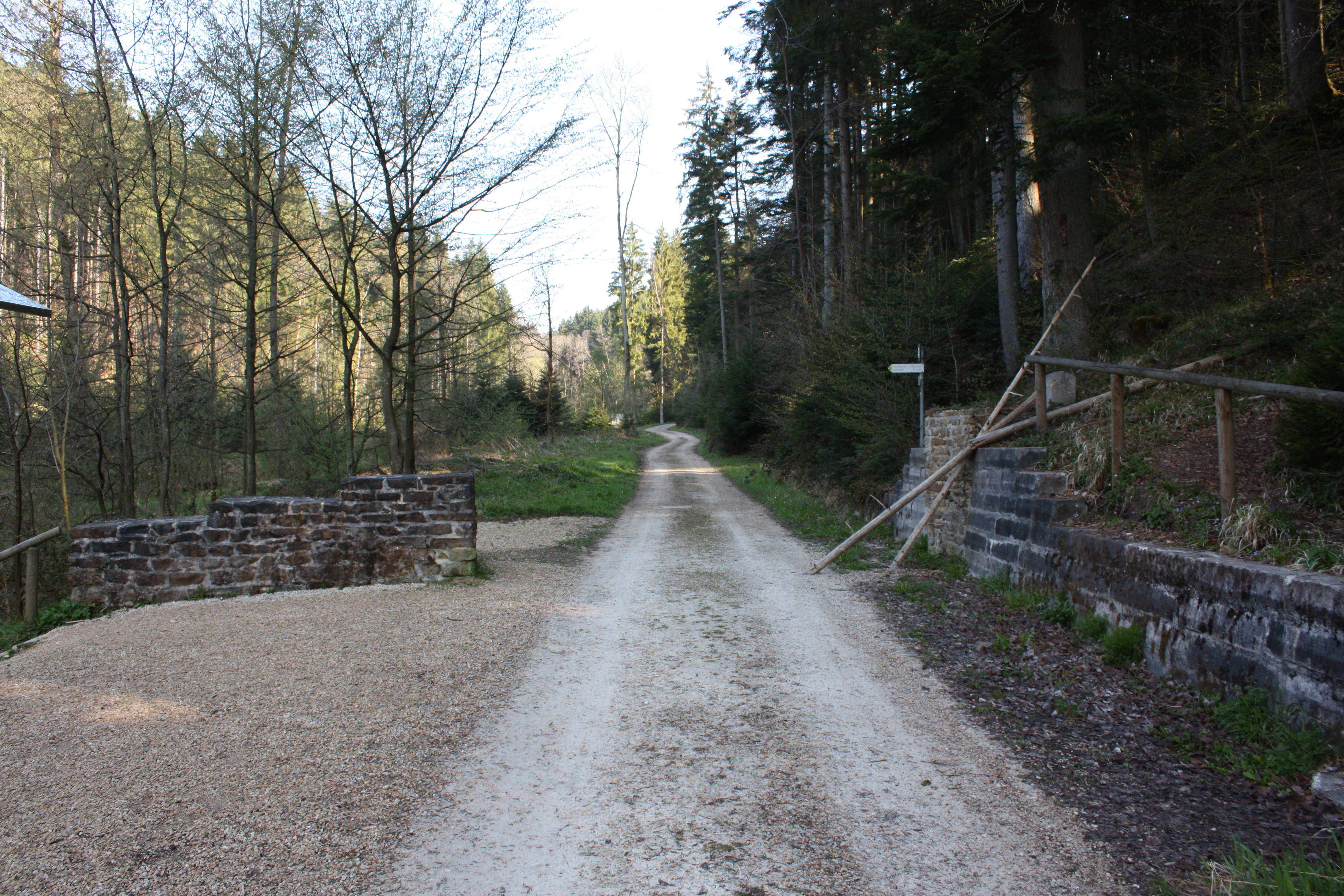 Ein rekonstruiertes Stück des Raetischen Limes im Rotenbachtal (Schwäbisch Gmünd), etwa 900 Meter vom Taleingang und vom Kleinkastell Freimühle entfernt. Ca. 90 m westlich von dieser Stelle endet der Obergermanische und beginnt der Raetische Limes. Ansicht von Süden. In den feuchten Sedimenten des Rotenbachs erhielten sich mehrere Eichenholzpfähle (1977 und 1983 untersucht), die im Winter 163/164 n. Chr. gefällt wurden.